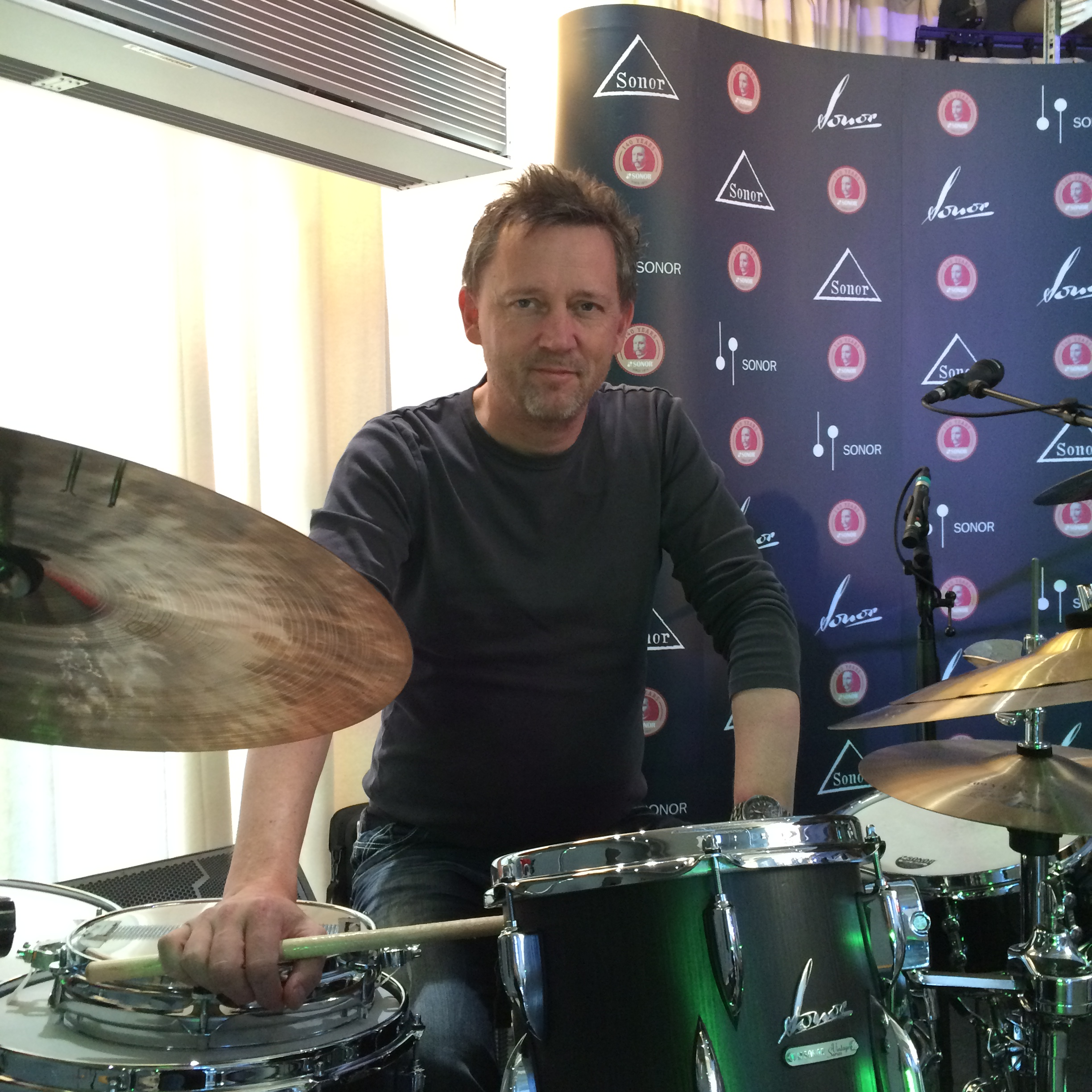 Der Schlagzeuger Rene Creemers am 1.10.2015, SONOR Promotiontour, PPC Hannover